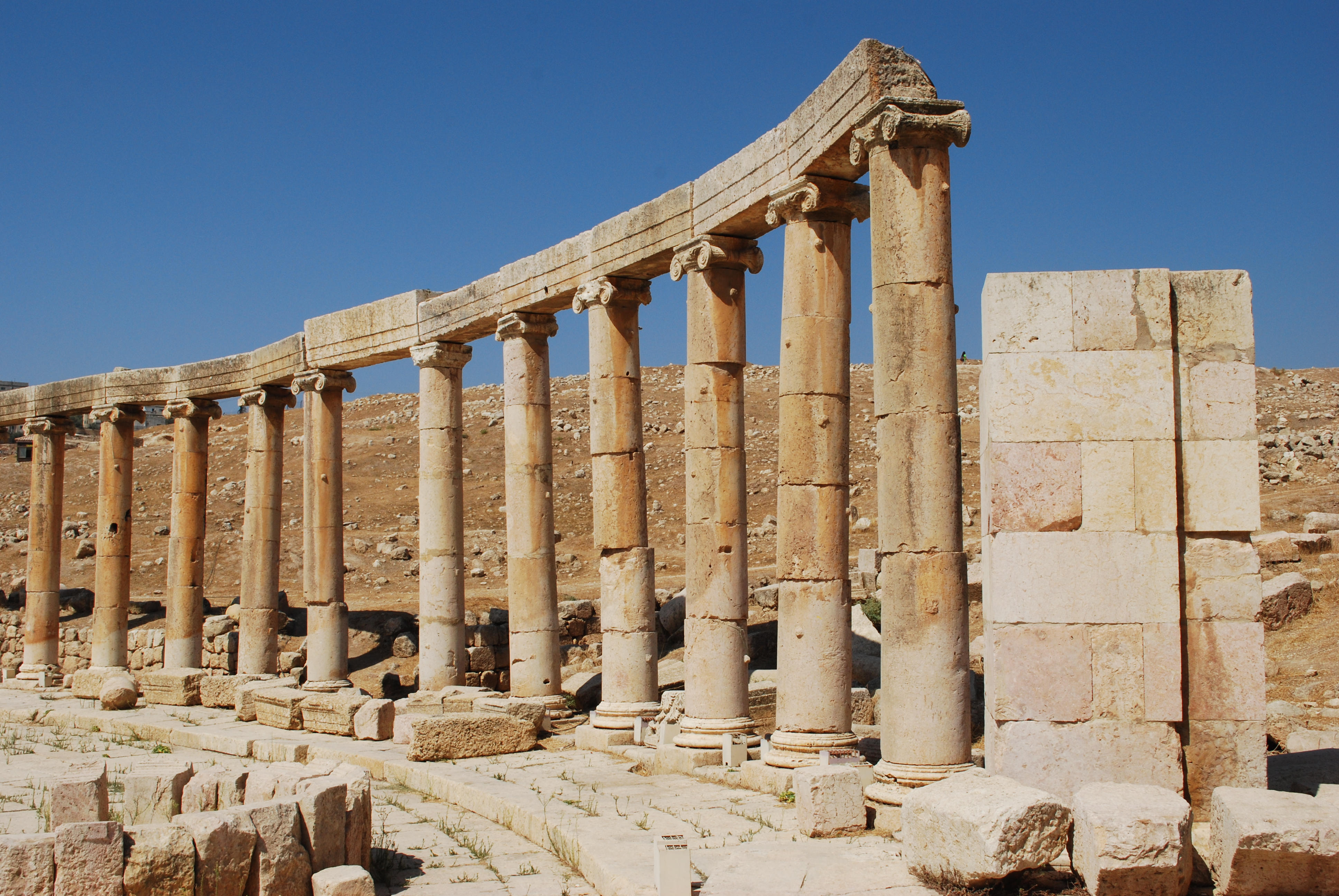 Forum de Gerasa.